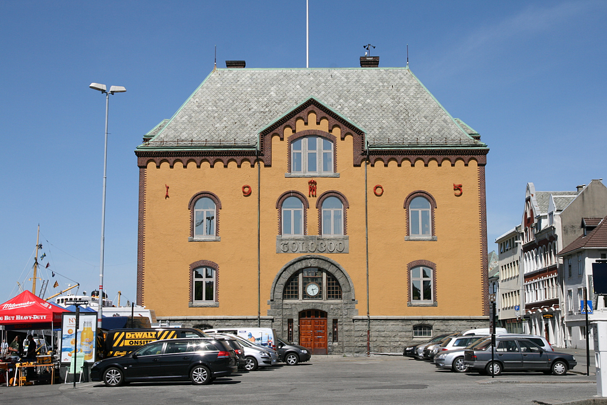 Tollboden